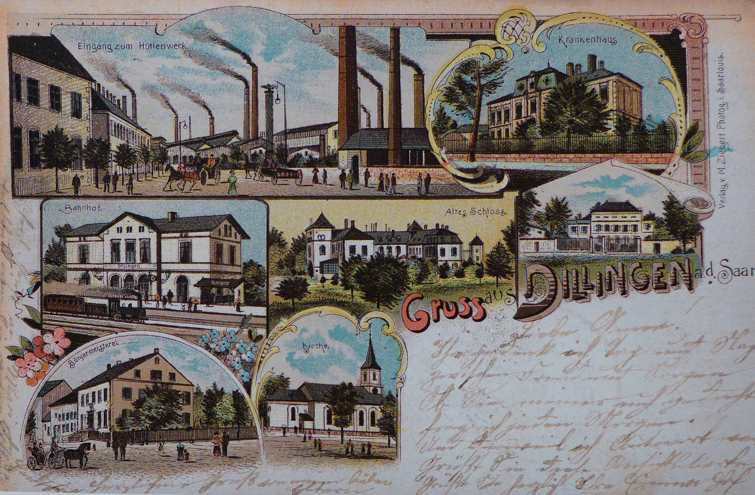 Postkarte Dillingen a.d. Saar aus dem Jahr 1898 (Archiv der Dillinger Hütte)